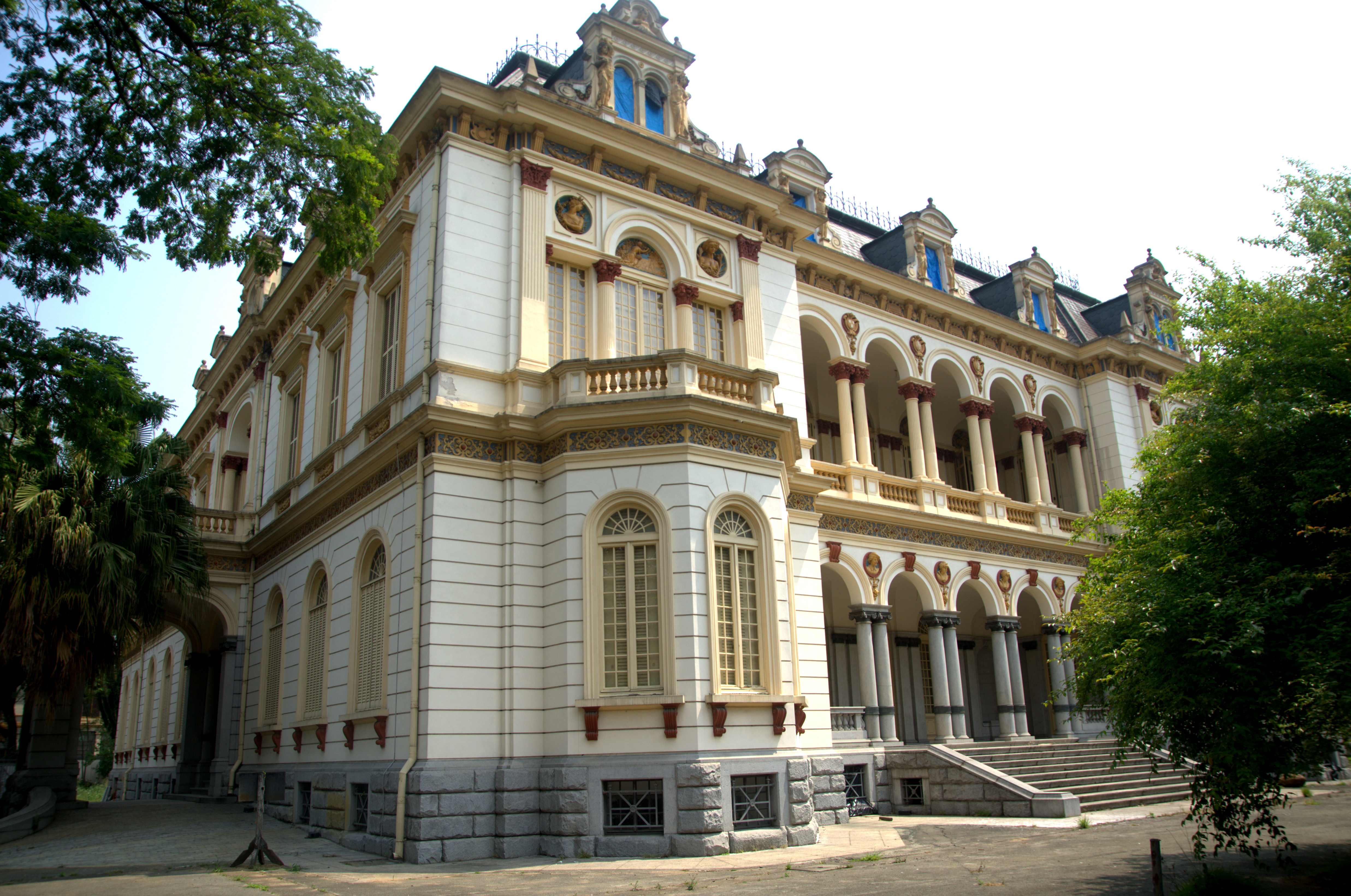 FACHADA PALÁCIO DOS CAMPOS ELÍSIOS ABERTA